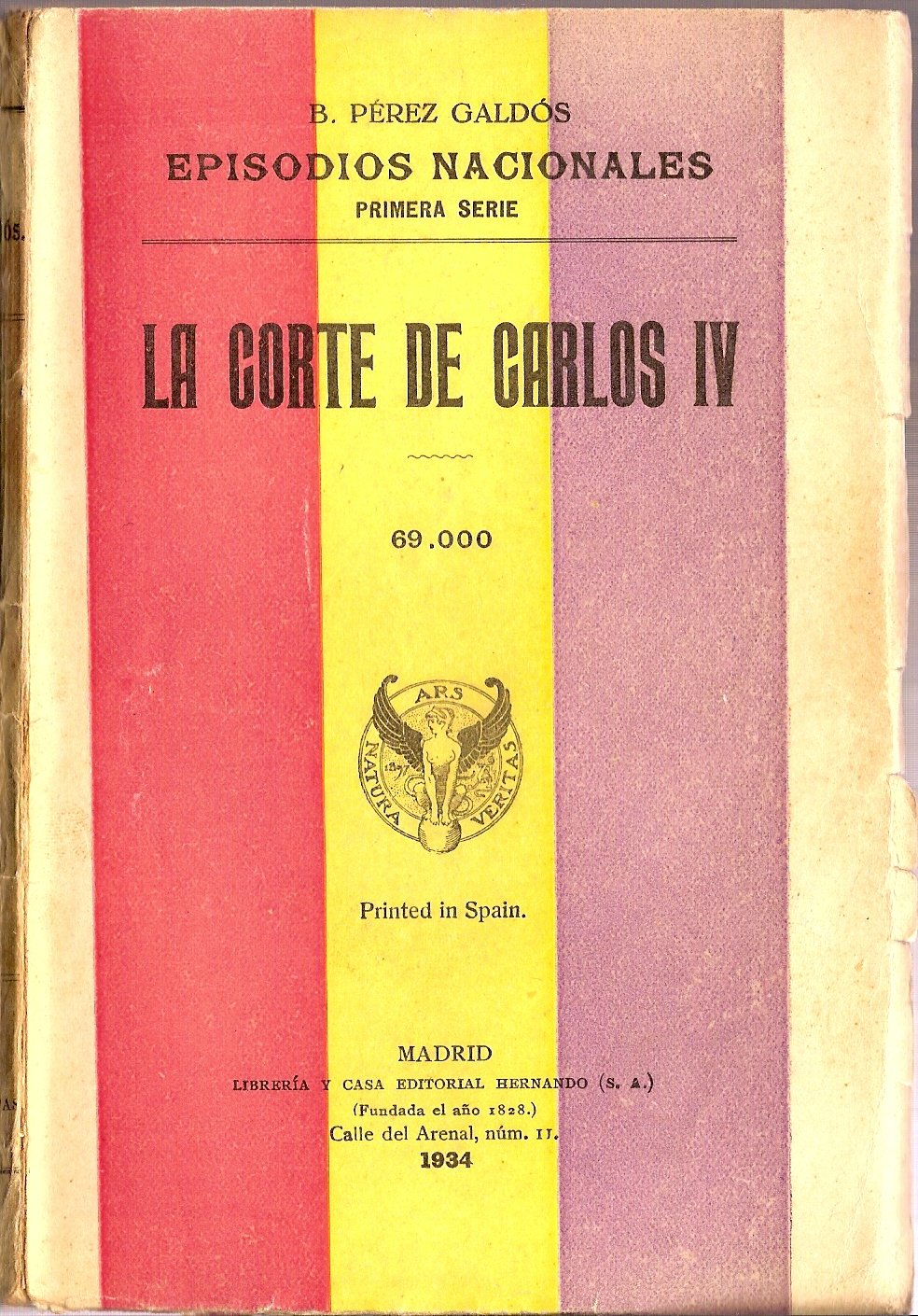 Portada del Episodio Nacional La Corte de Carlos IV, publicado por la Librería y Casa Editorial Hernando (S. A.) en Madrid, 1934